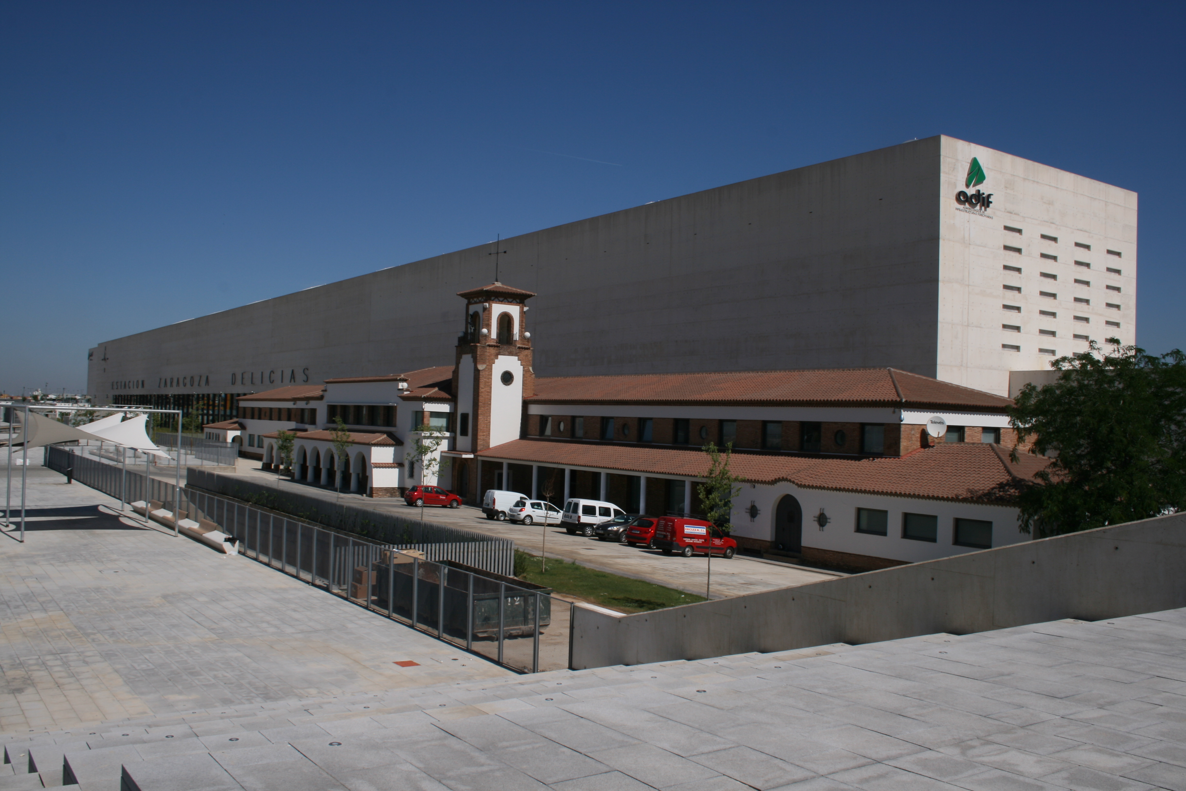 Estación de tren de Zaragoza